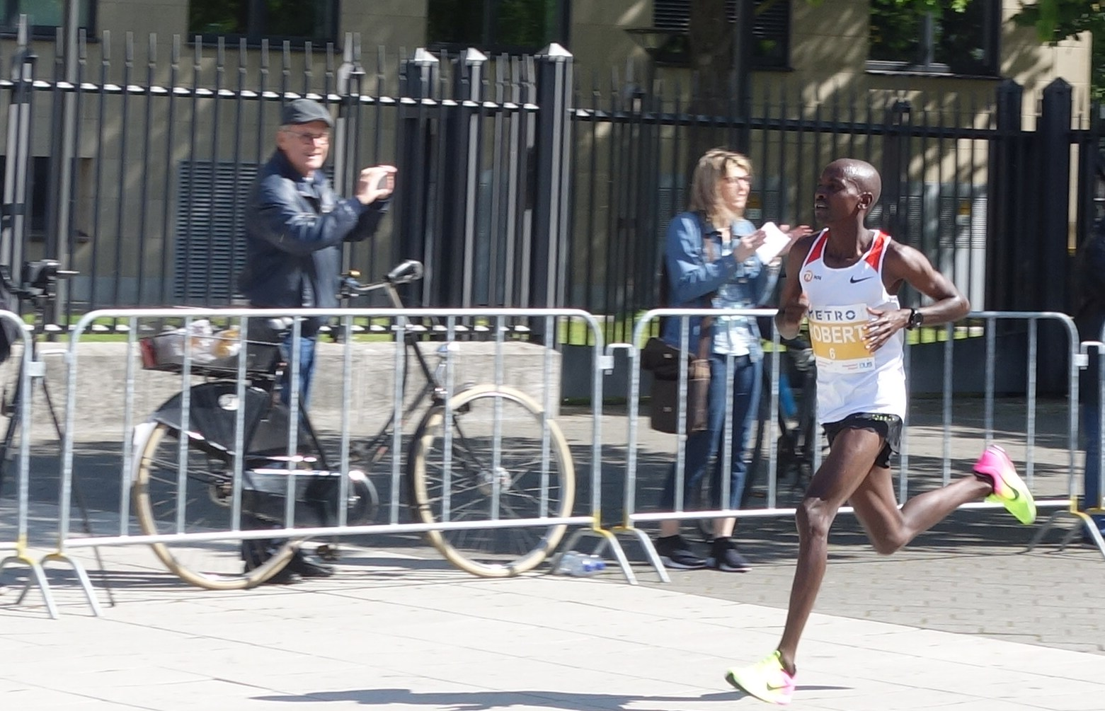 METRO-Marathon in Düsseldorf, 30. April 2017 . Der Sieger Robert Chemonges (* 1997) aus Uganda.